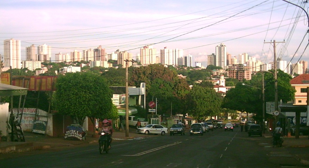 Vista de Campo Grande